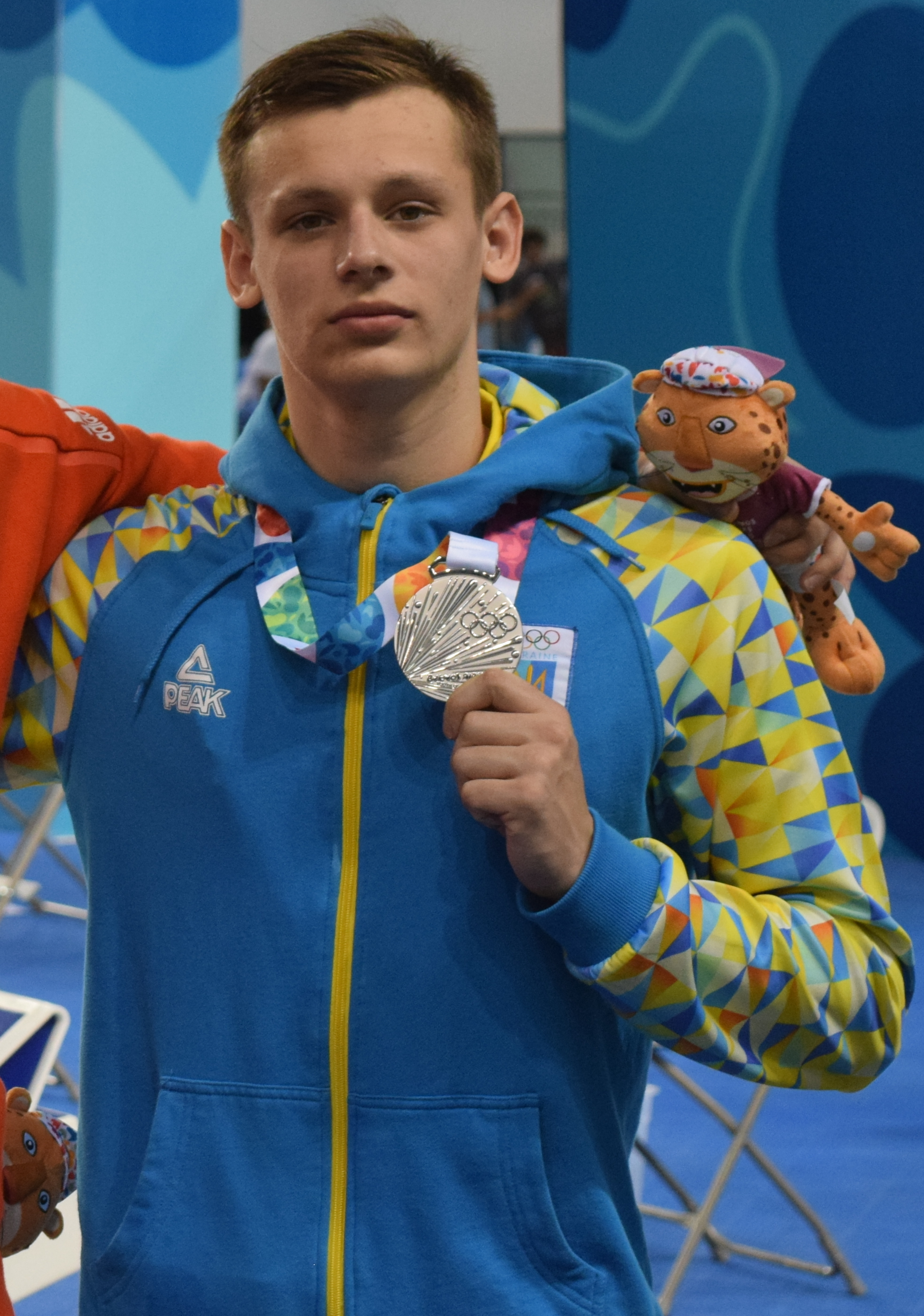 inales de natación , durante los Juegos Olímpicos de la Juventud 2018 en Buenos Aires. Tarde del 10 de octubre. Kristof MILAK, Denys KESIL y Federico BURDISSO.